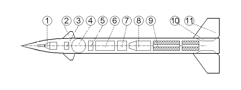 Aufbau der Rakete 9M33, Skizze, ohne Maßstab